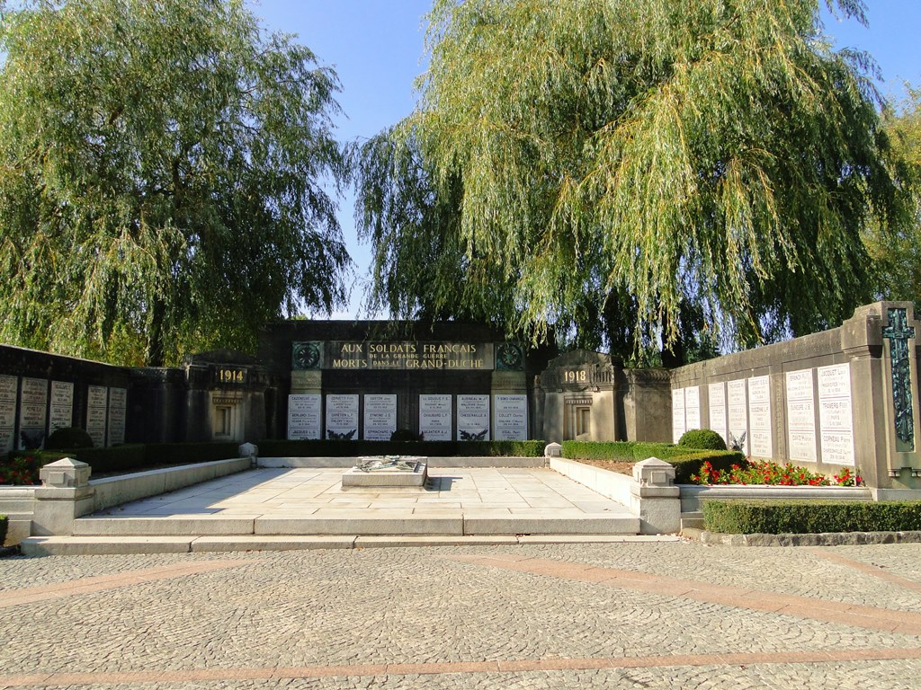 Le Mausolée des soldats français de la Grande Guerre, morts dans le Grand-Duché, et du légionnaire luxembourgeois inconnu, construit par les architectes luxembourgeois Joseph Nouveau et Léon Muller, inauguré le 16 novembre 1924, renferme les cercueils de cinquante-six soldats français et d'un légionnaire luxembourgeois inconnu. Le monument est formé d'un enclos délimité sur trois côtés par un mur sur lequel sont apposées des plaques de marbre avec les noms des disparus. Au milieu de la plate-forme se trouve la tombe du légionnaire luxembourgeois. La disposition du monument traduit l'aménagement de son sous-sol, vaste caveau dont l'accès est muré par la dalle en granit du tombeau du soldat inconnu. Le mausolée, en granit de Bohême et en grès blanc de Larochette, a été réalisé par la firme Jacquemart. Les éléments sculptés sont d'Ernest Grosber, le décor en bronze, de Michel Haagen.